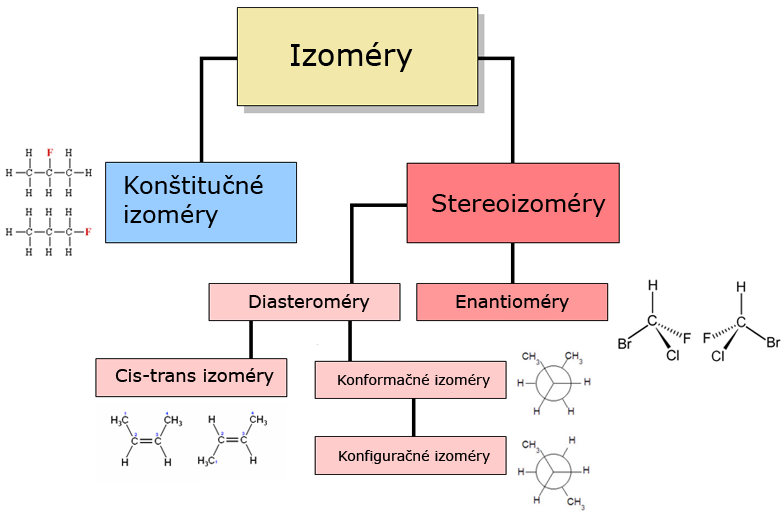 Rozdelenie izomérov